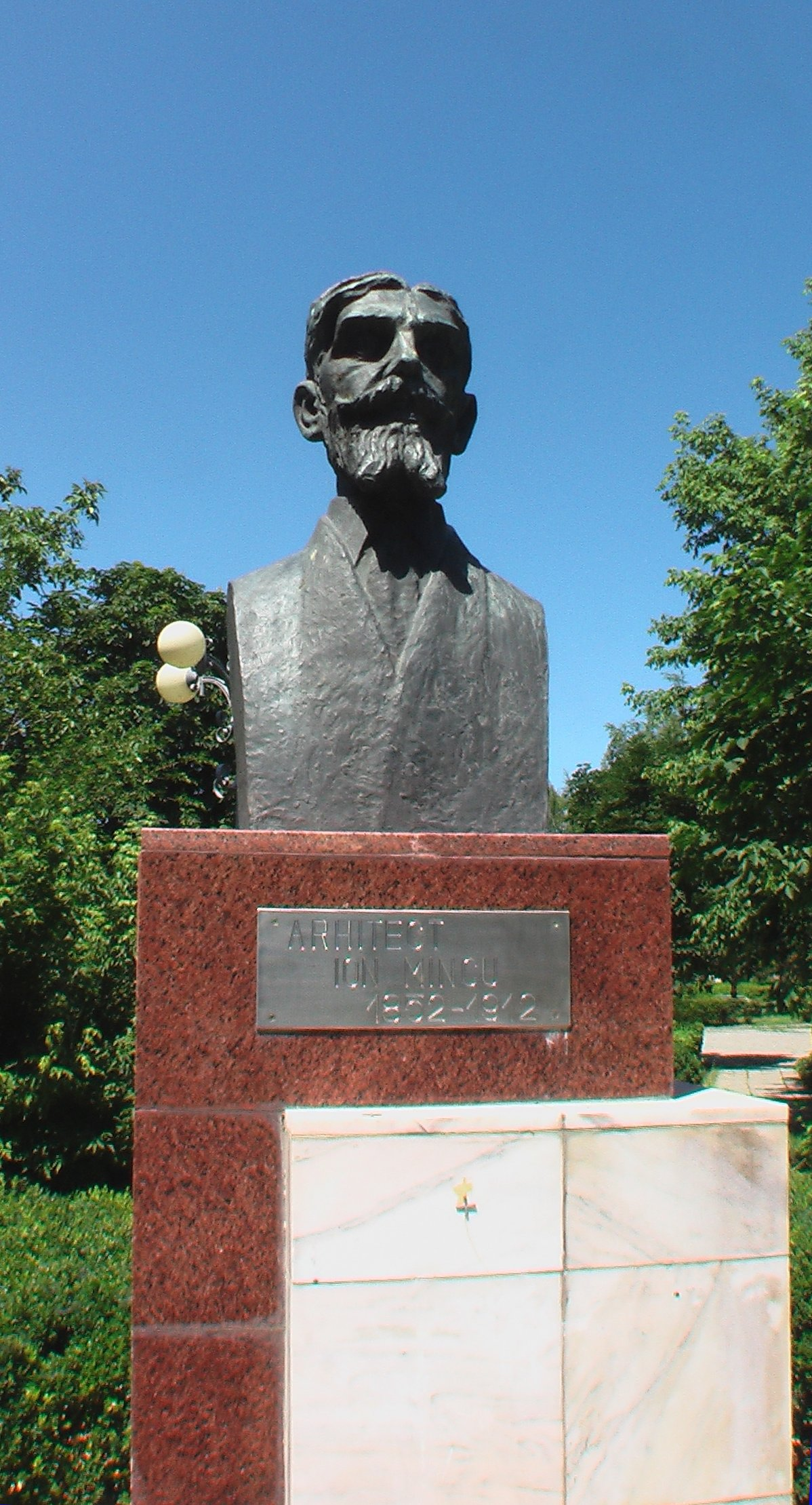 IonMincuBüsteInFocsani